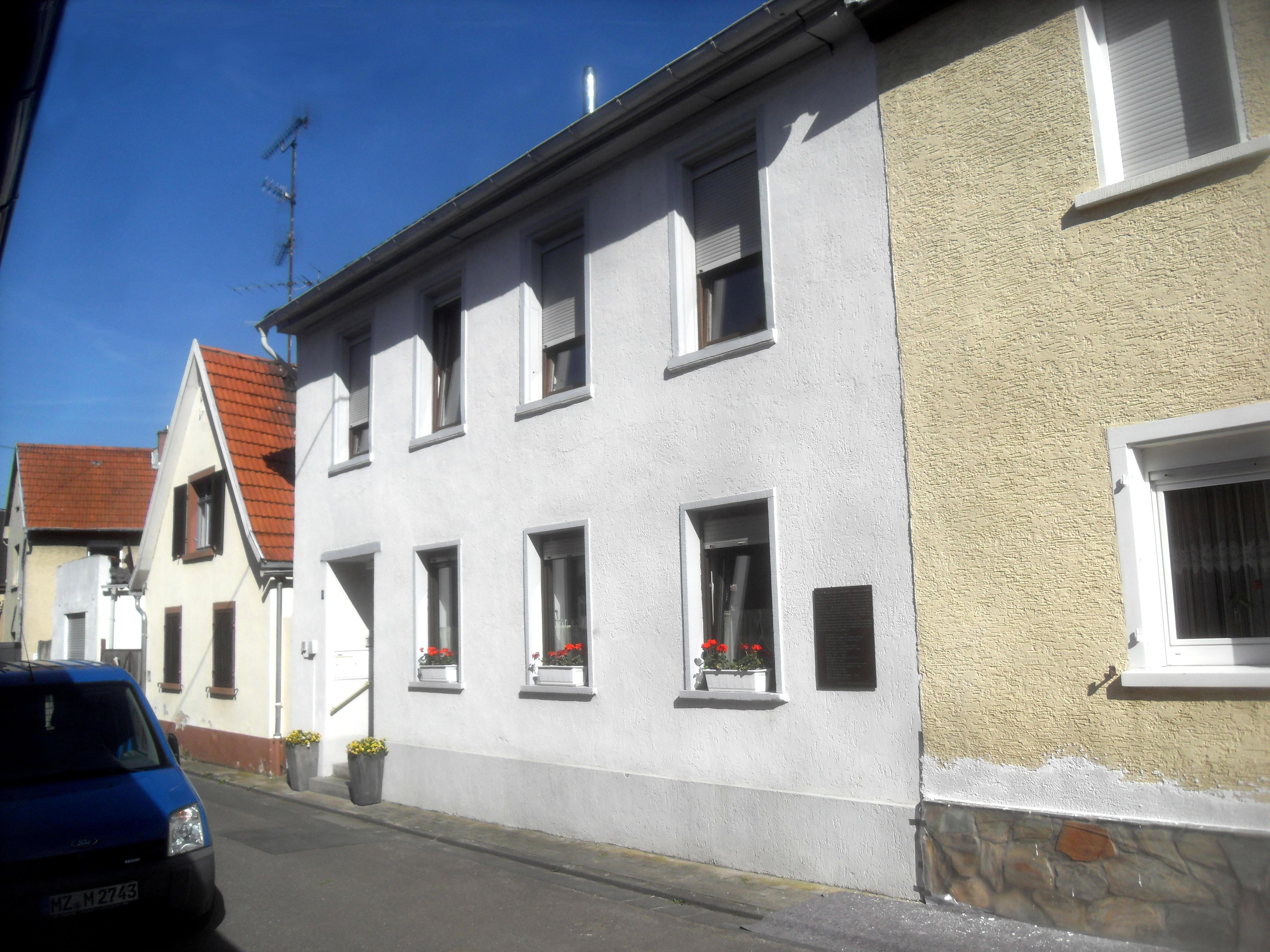 Die ehemalige Judenschule neben der ehemaligen Synagoge in der heutigen Viehgasse im rheinhessischen Guntersblum in Rheinland-Pfalz (Deutschland)